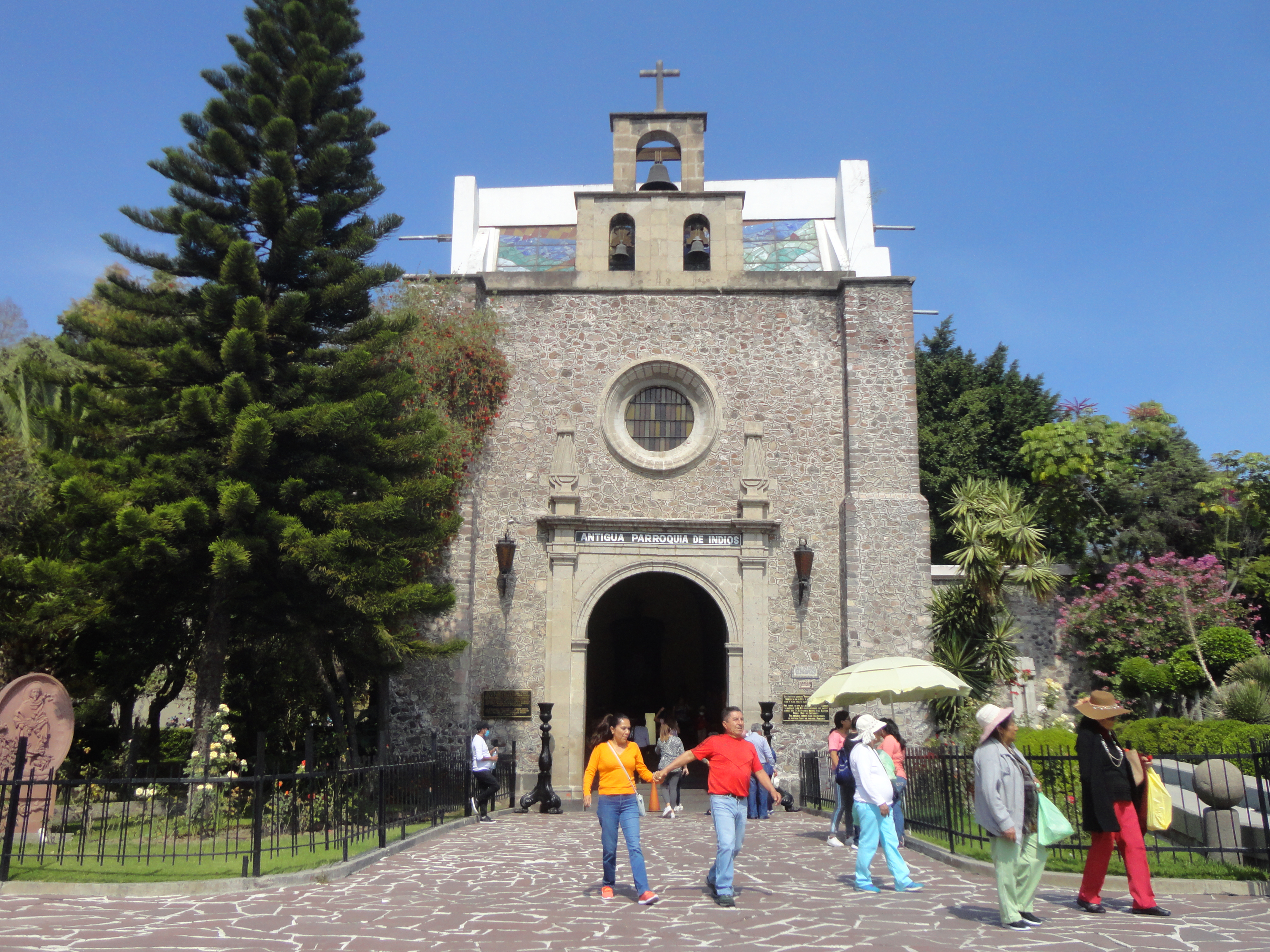 Capilla de Indios, La Villa de Guadalupe, Ciudad de México.